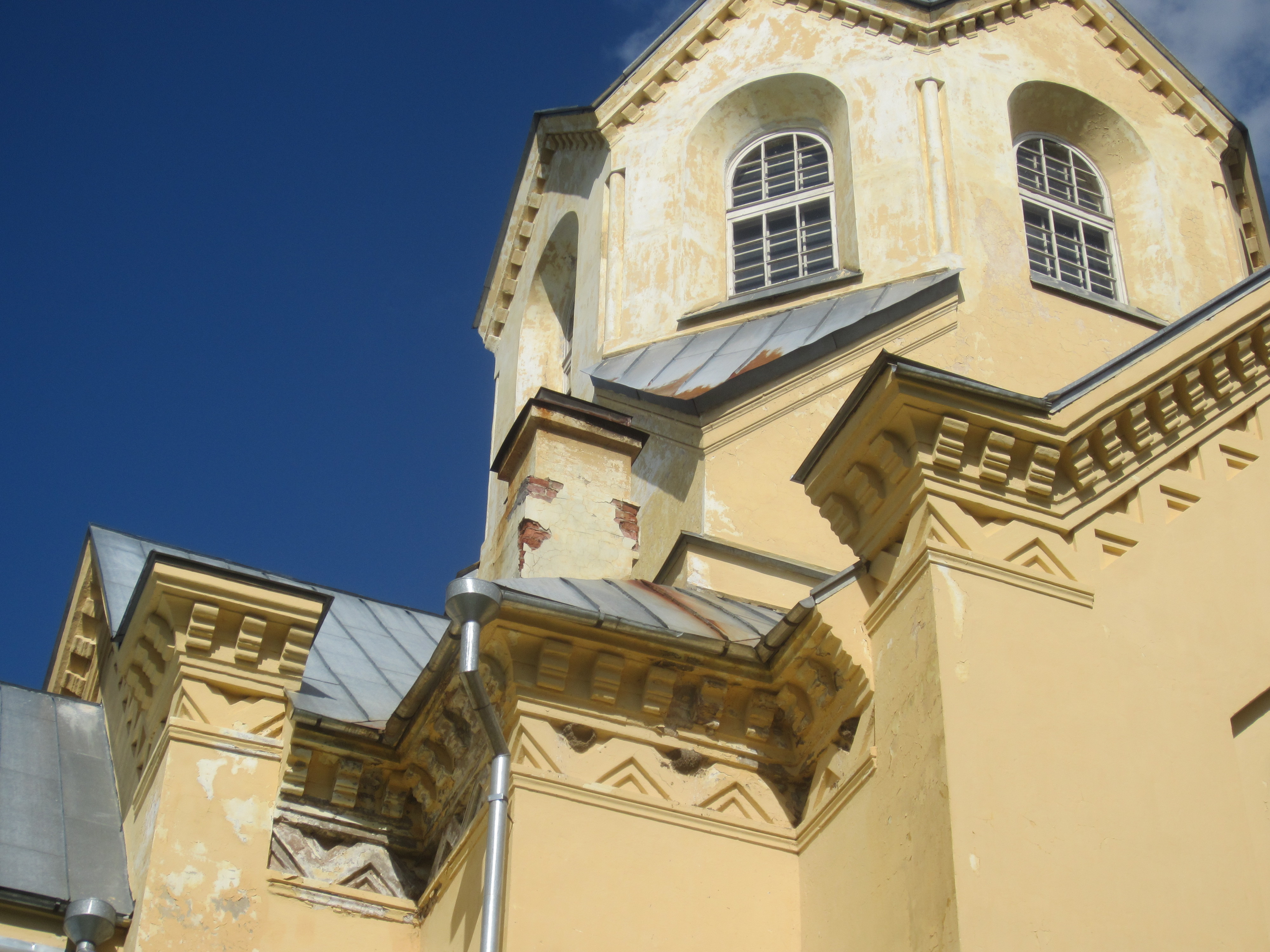 Церковь во имя Честных Древ Святого и Животворящего Креста в поселке Лисино-Корпус. Фрагмент карниза.